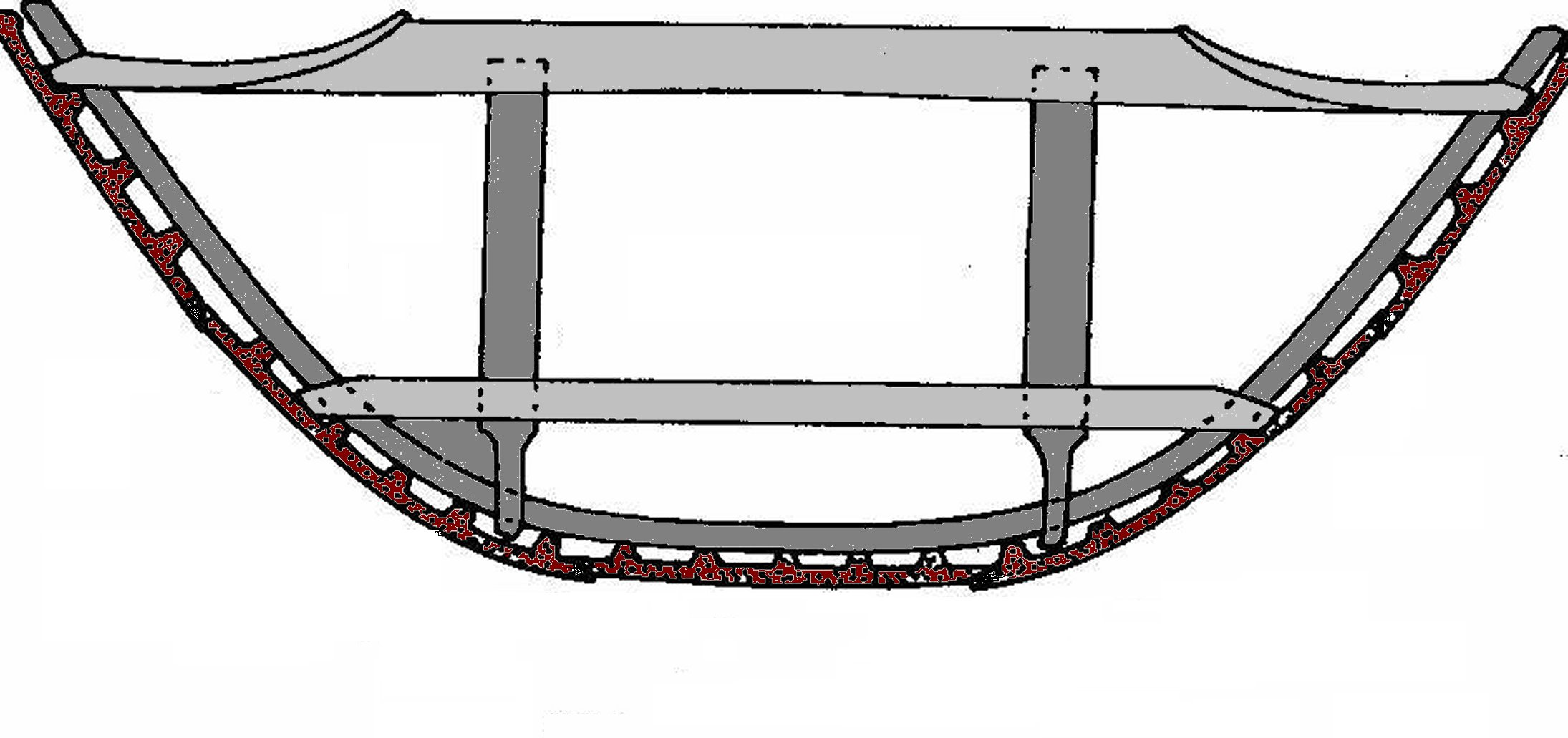 eigen tek.